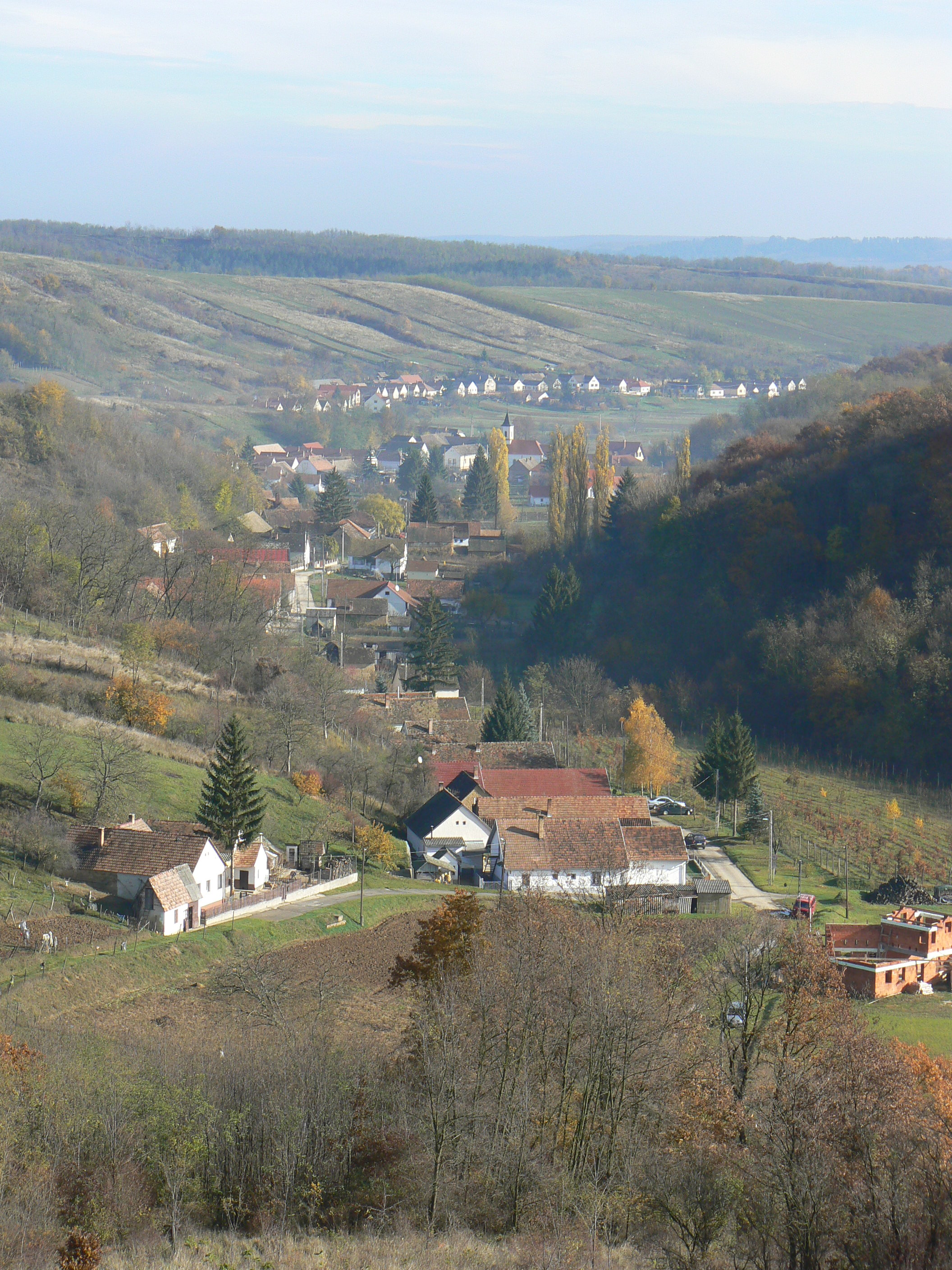 Ófalu, látkép